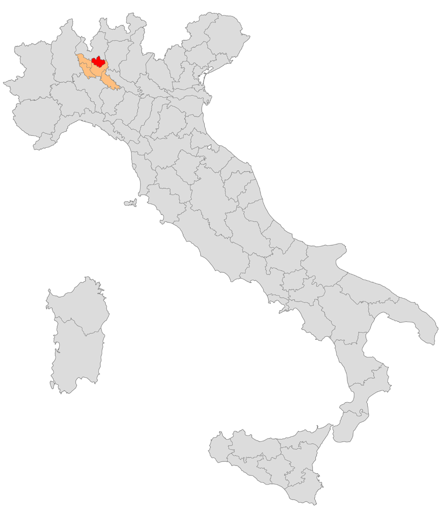 Mappa del circondario di Monza nella provincia di Milano (1859-1926)